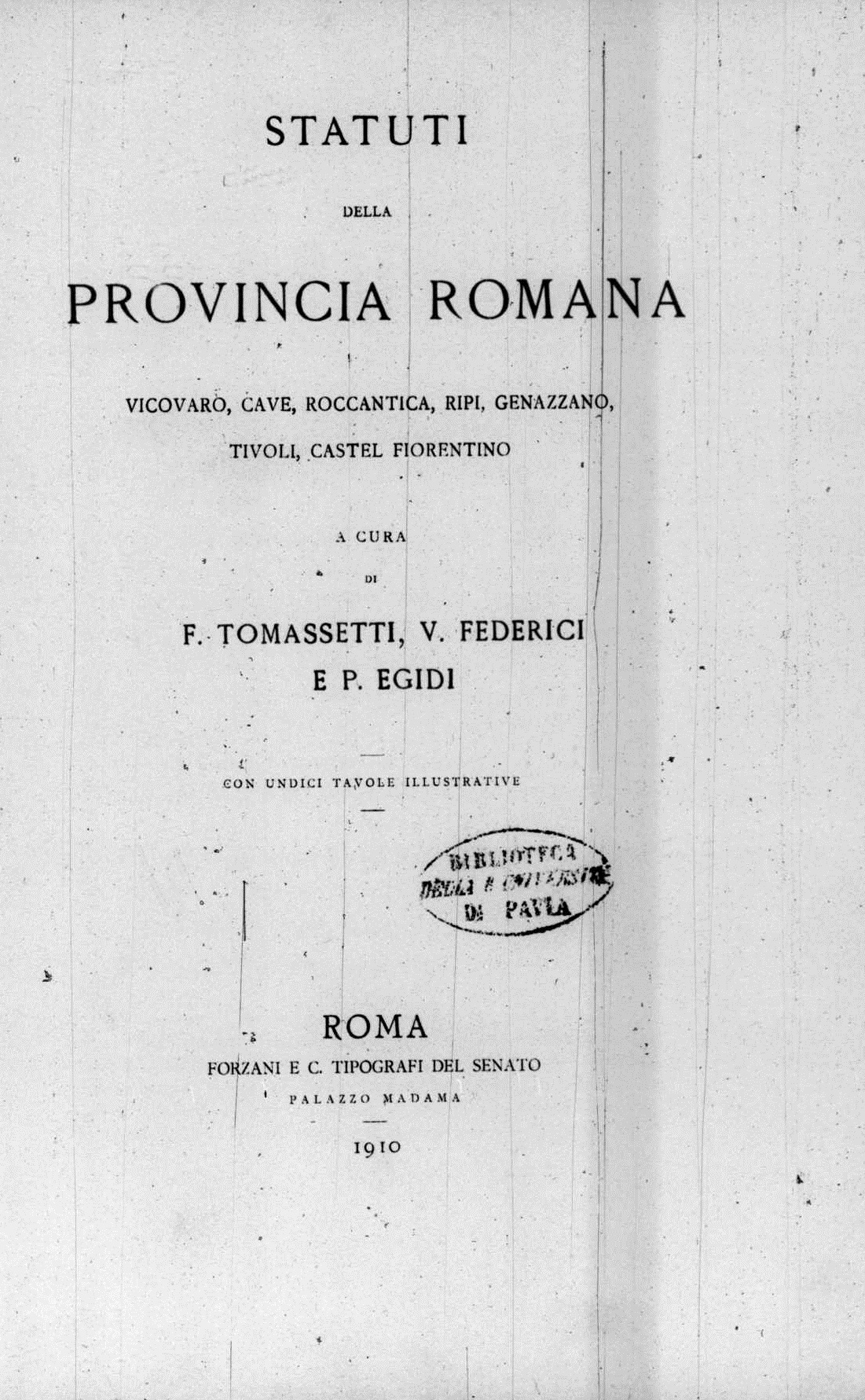 Frontespizio